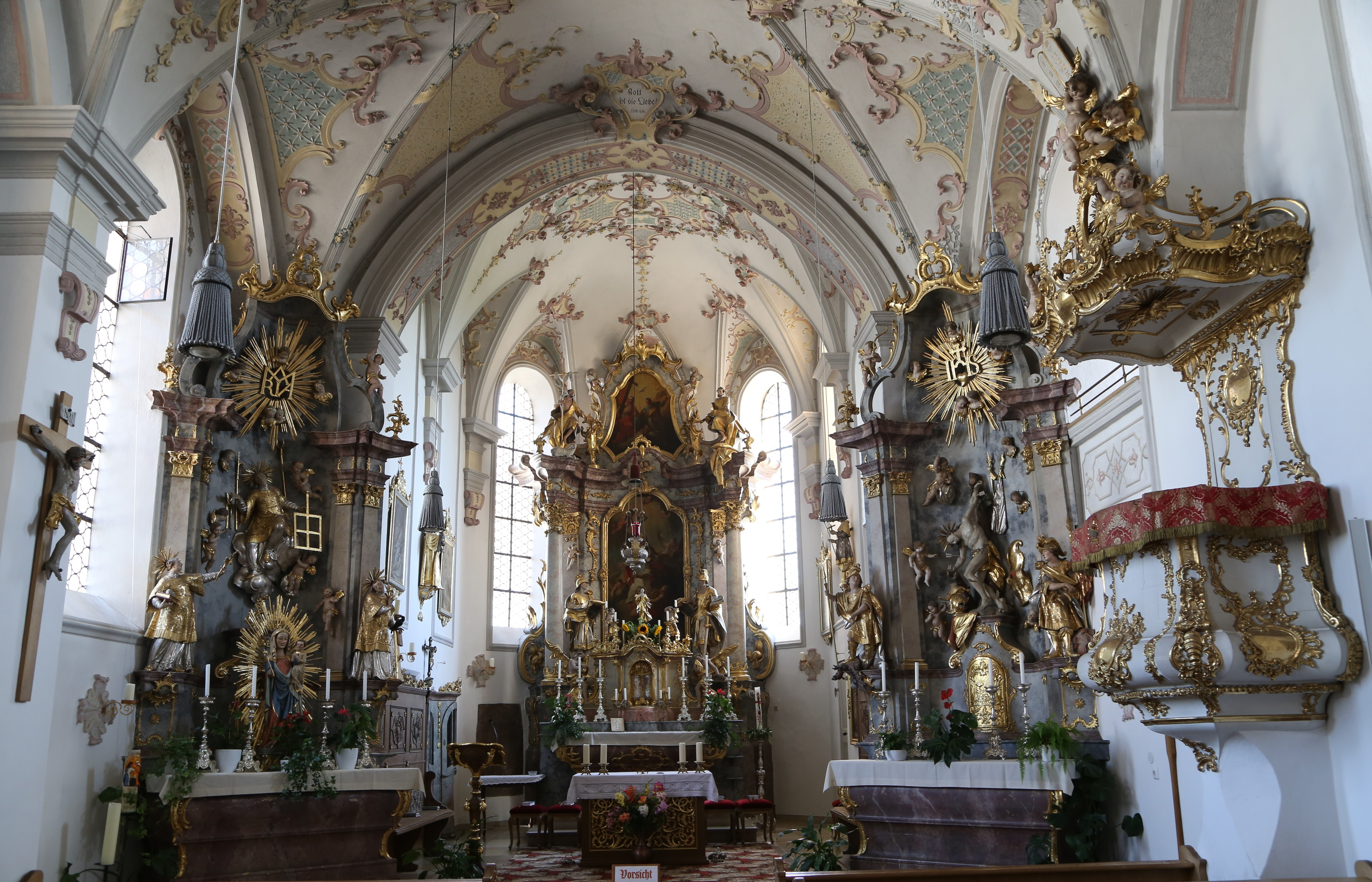 Kirchplatz 2, Höslwang; Kath. Pfarrkirche St. Nikolaus, Saalbau mit Satteldach, Nordturm mit Zwiebel, eingezogenem Chor und südlichem doppelstöckigen Anbau als Oratoriengang (Antoniuskapelle von 1693), spätgotisch, im Kern 15. Jh., barocker Ausbau 1734 durch Martin Pöllner, 1740 Turmoberbau, 1922 Verlängerung mit baulicher Verbindung zum westlichen Pfarrhof; mit Ausstattung.